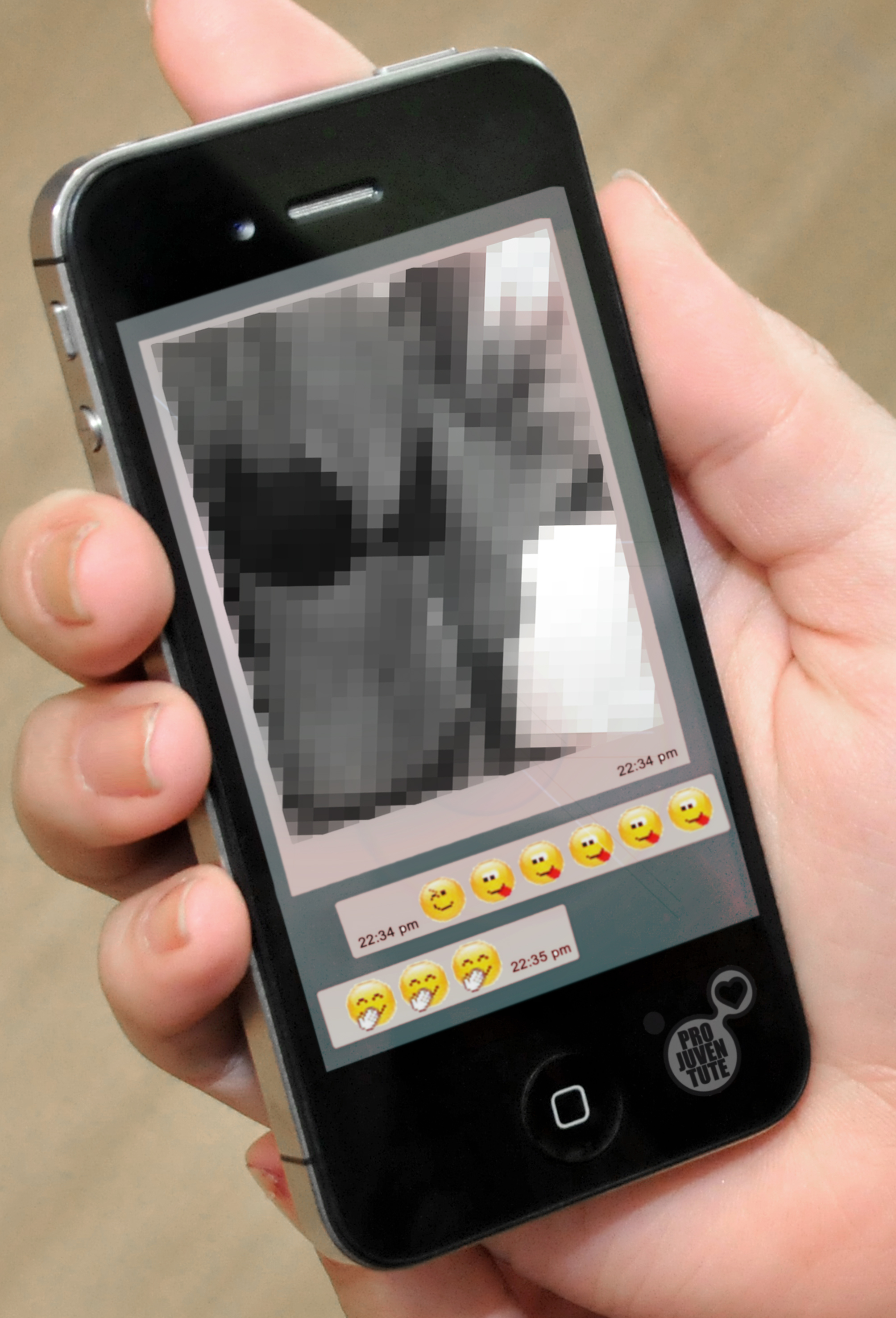 Aufklärungskampagne ‚Sexting’ Bildmaterial mit Copyright der Quellenangabe zur freien Verfügung verwendbar (©Pro Juventute) Unter dem Slogan ‚Sexting kann dich berühmt machen. Auch wenn du es gar nicht willst.‘ macht die Aufklärungskampagne von Pro Juventute auf Risiken von Sexting aufmerksam. Ein TV-Spot und Plakate zeigen provokativ auf, dass der Missbrauch von intimen Fotos harte Konsequenzen haben kann – für Betroffene wie für Täter. Mit einer für die Kampagne entwickelten Facebook-App können Jugendliche im Sinne eines Cyber-Risiko-Checks ihr Profil überprüfen. Auf der Kampagnenplattform finden Jugendliche und Eltern Informationen zum Thema. Allen Schulen in der Schweiz werden Materialien angeboten, um Jugendliche auf die Hilfe via Notrufnummer 147 von Pro Juventute aufmerksam zu machen.